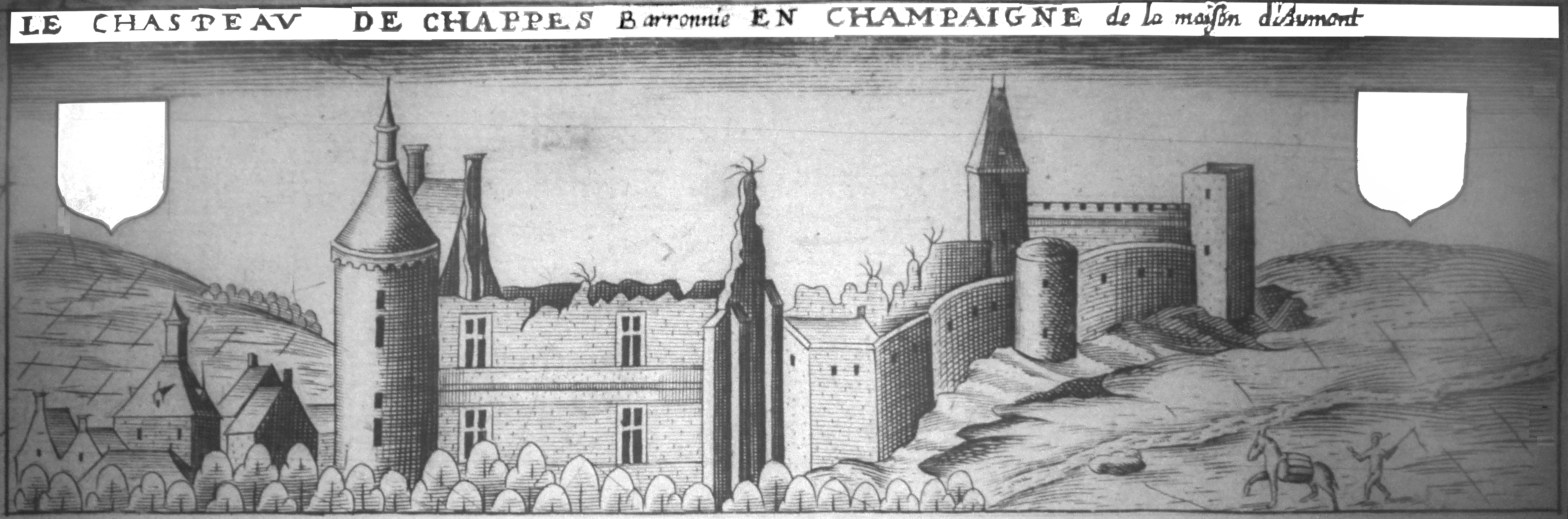 Le Chateau de Chappes.